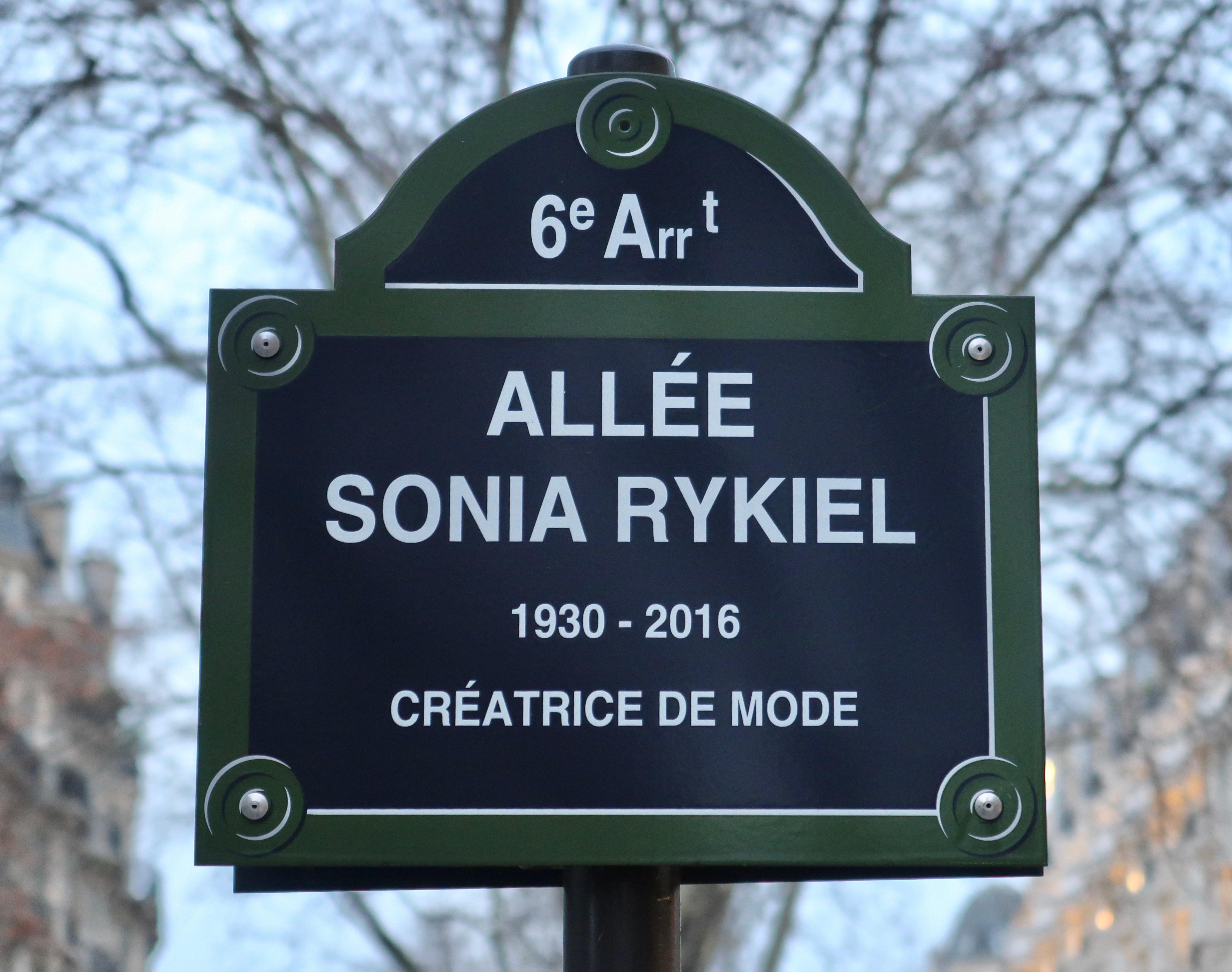 Plaque allée Sonia-Rykriel (Paris, 6e).